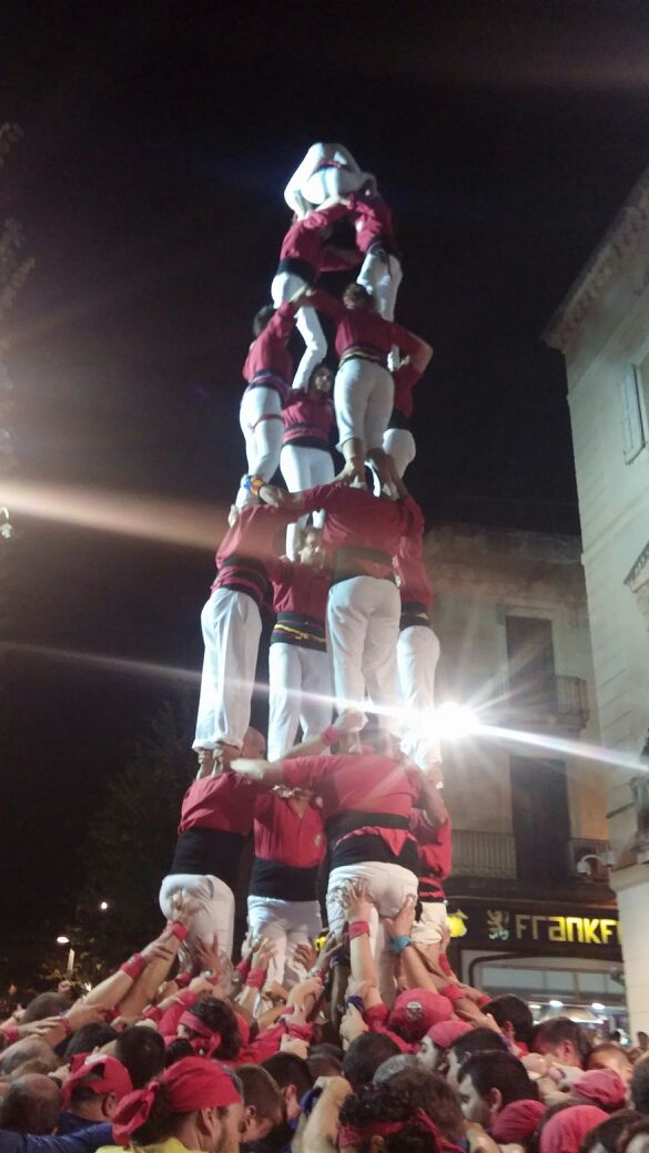 Primer 4d7 dels Castellers de l'Alt Maresme a Mataró 8/11/2014